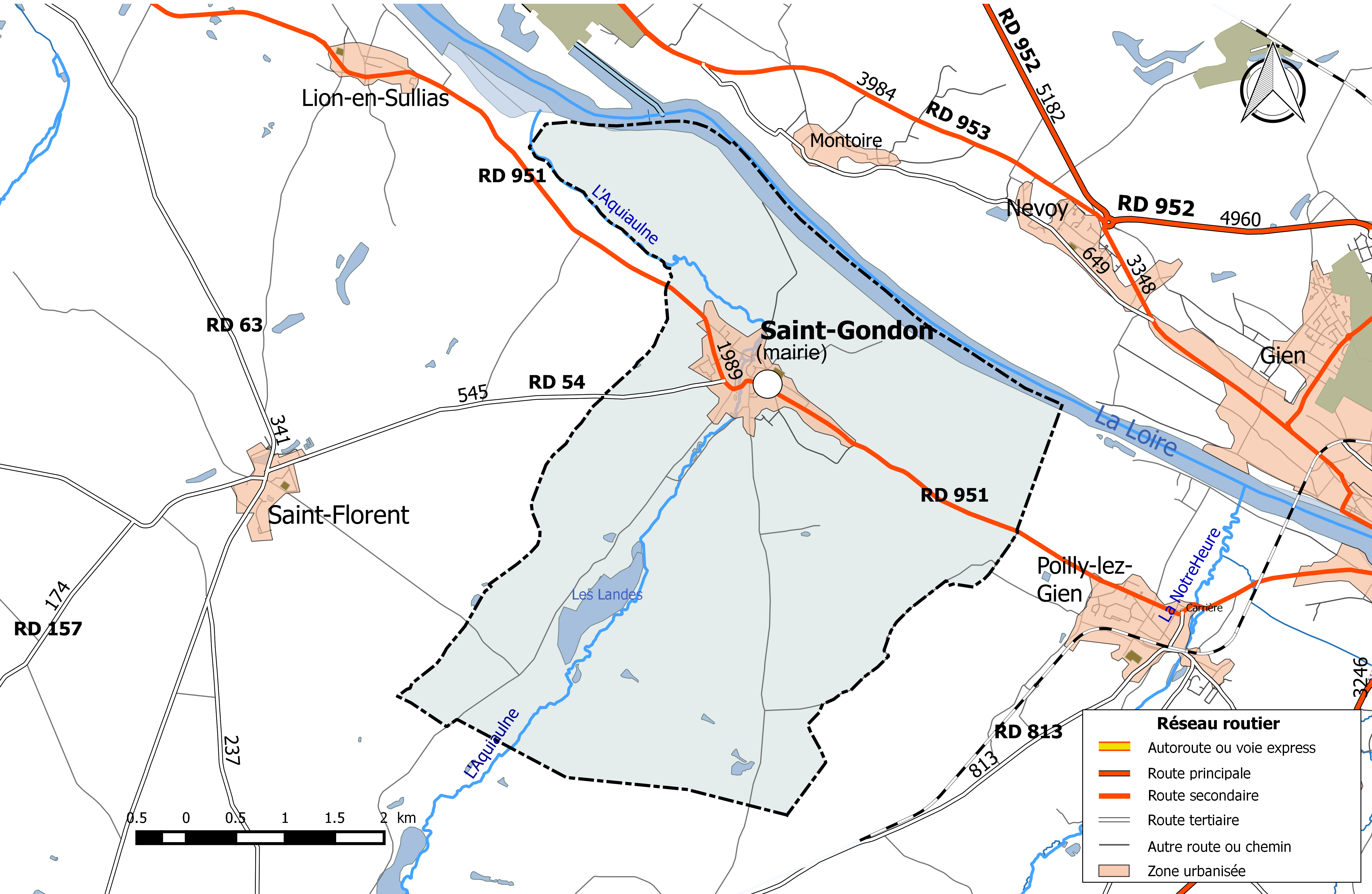 Carte du réseau routier de la commune de Saint-Gondon.